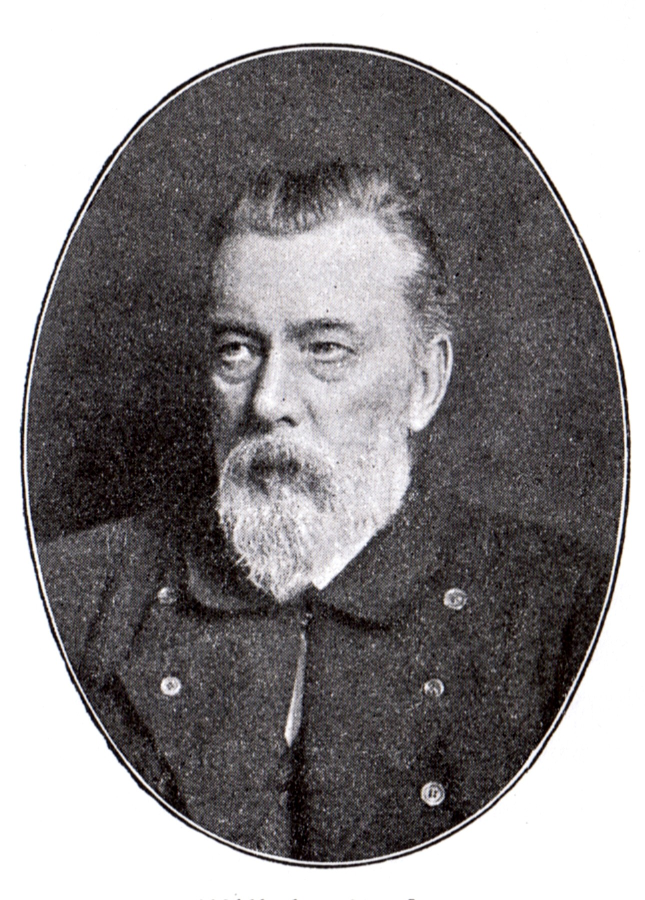 Wilhelm Jensen(1837-1911), deutscher Lyriker und Schriftsteller.